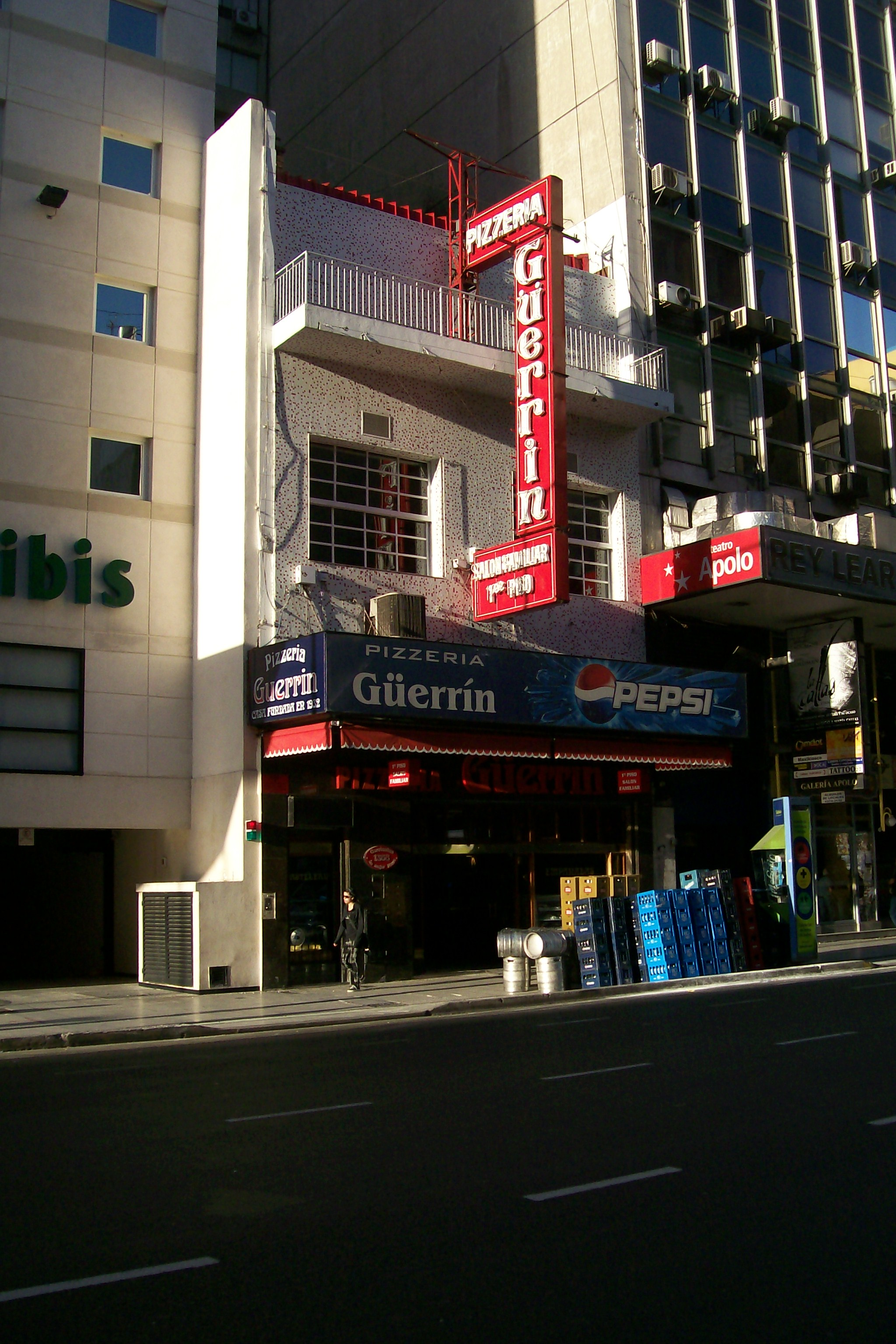 Pizzería Guerrín, Buenos Aires